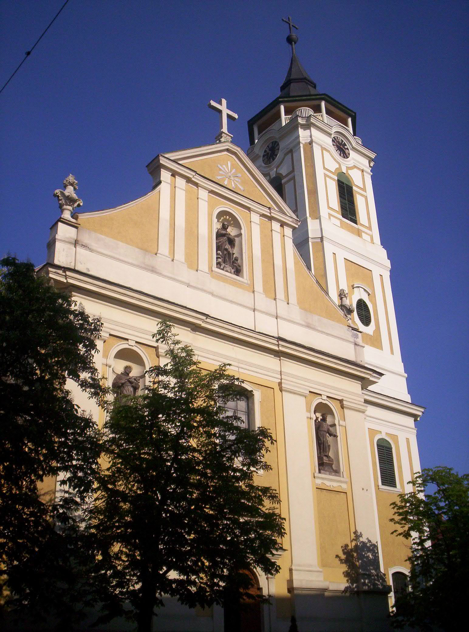 Páduai Szent Antal Római katolikus, ferences templom Baján. Épült: 1728 és 1756 között. – photo taken by uploader User:Csanády in 2006.